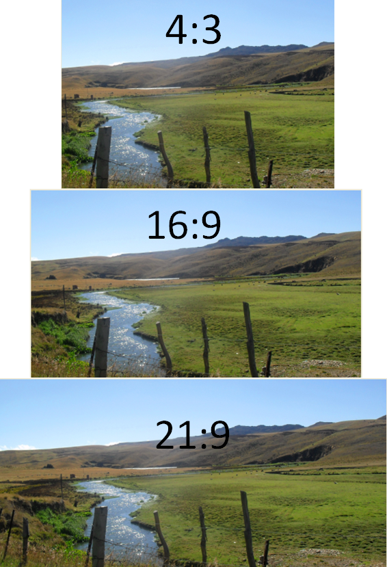 Diferencias de formato,carta (4:3),hd (16:9) y cine (21:9).